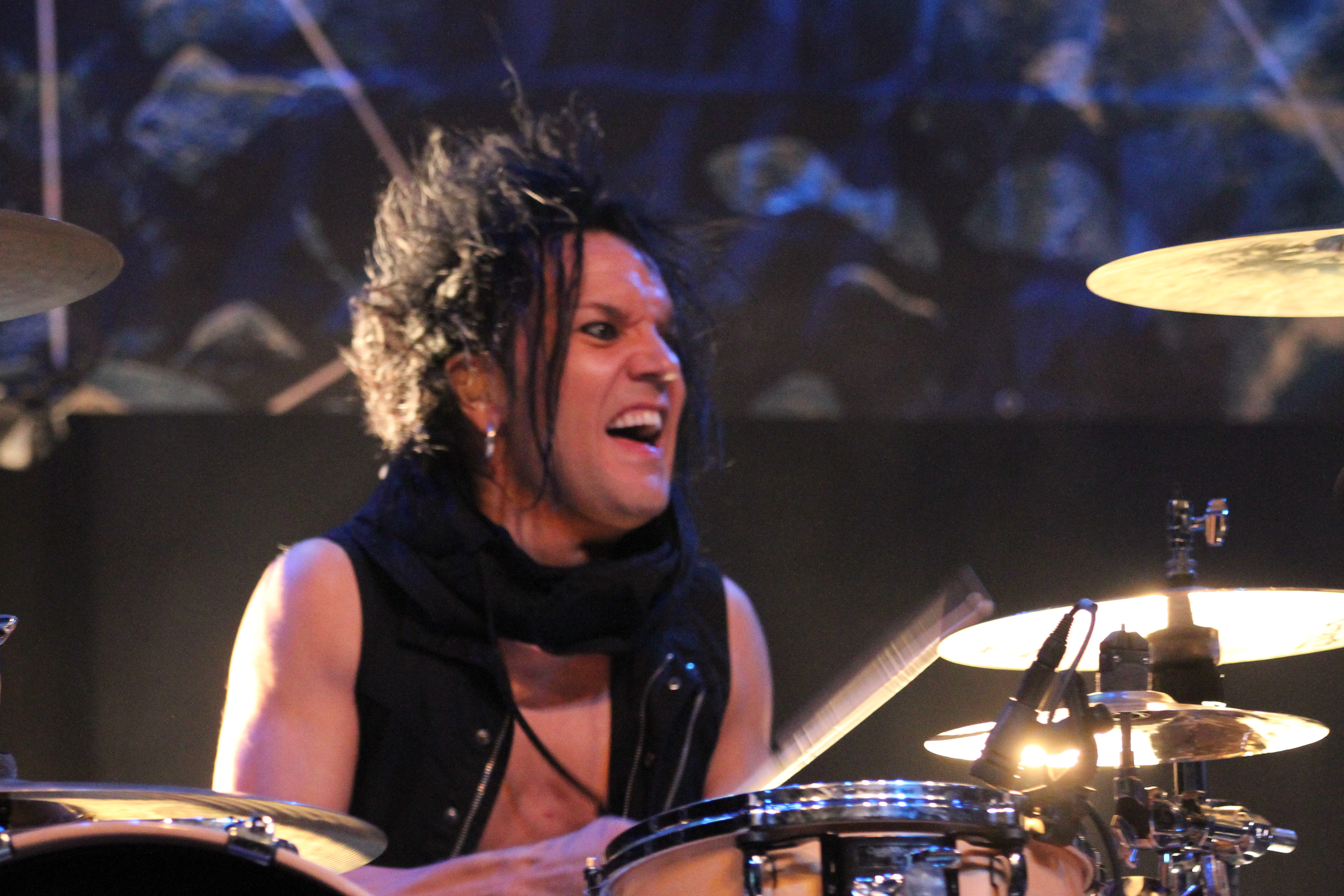 The 69 Eyes auf dem Wave-Gotik-Treffen 2013 in der Agra-Halle.